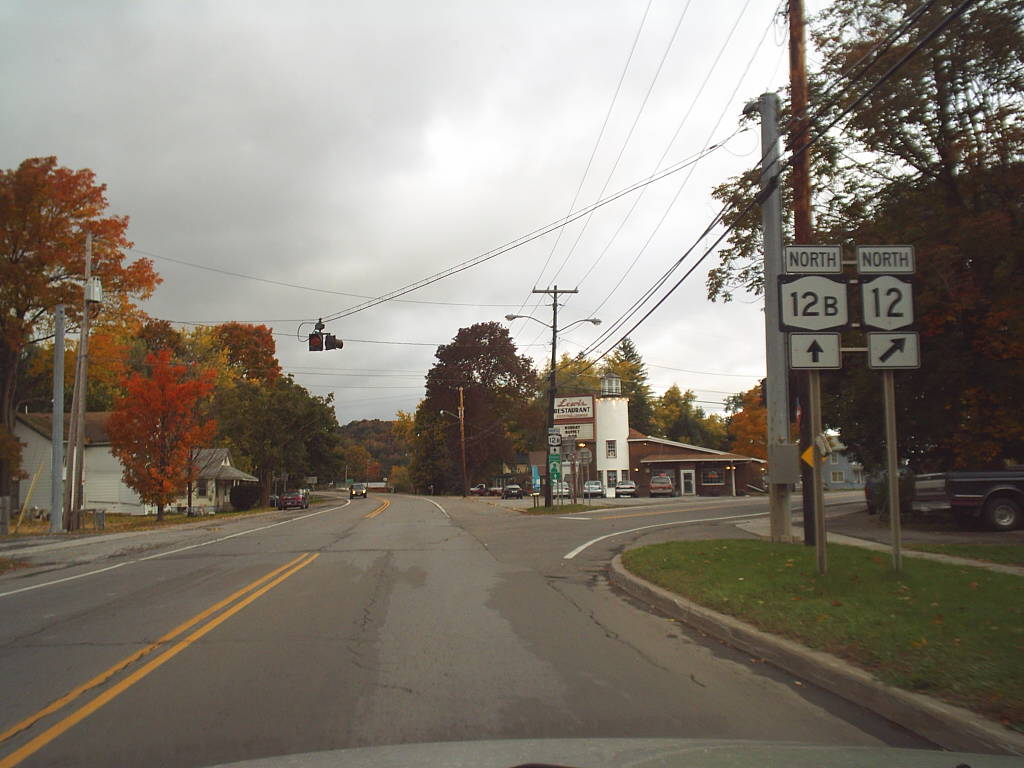 M3367S-4504